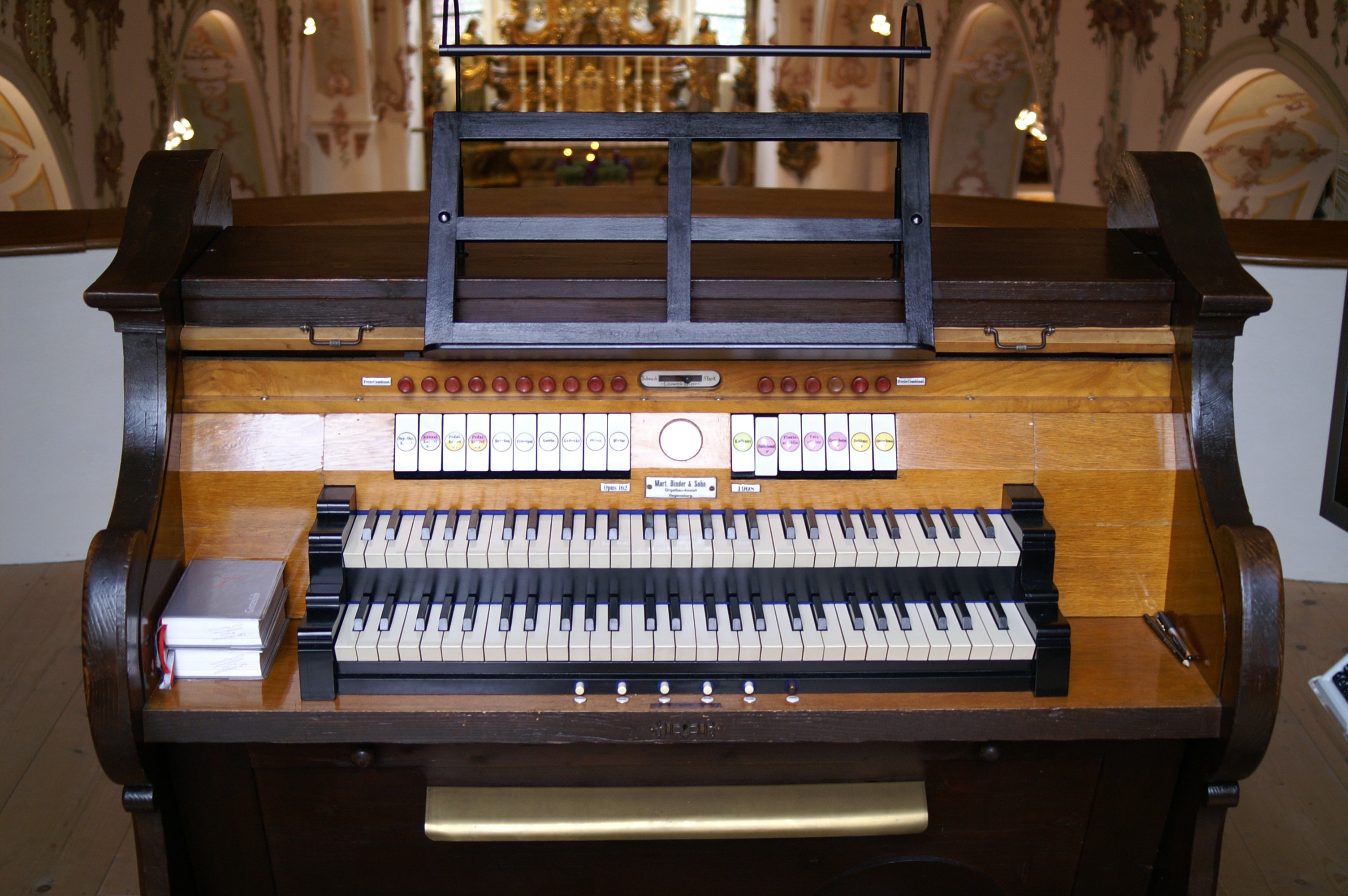 Spieltisch der Binder & Siemann-Orgel von St. Kassian in Regensburg